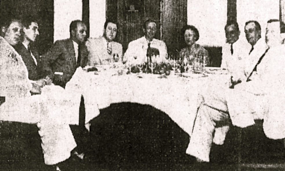 Almoço oferecido pelo Automóvel Clube do Brasil à corredora Hellé Nice e seu mecânico.